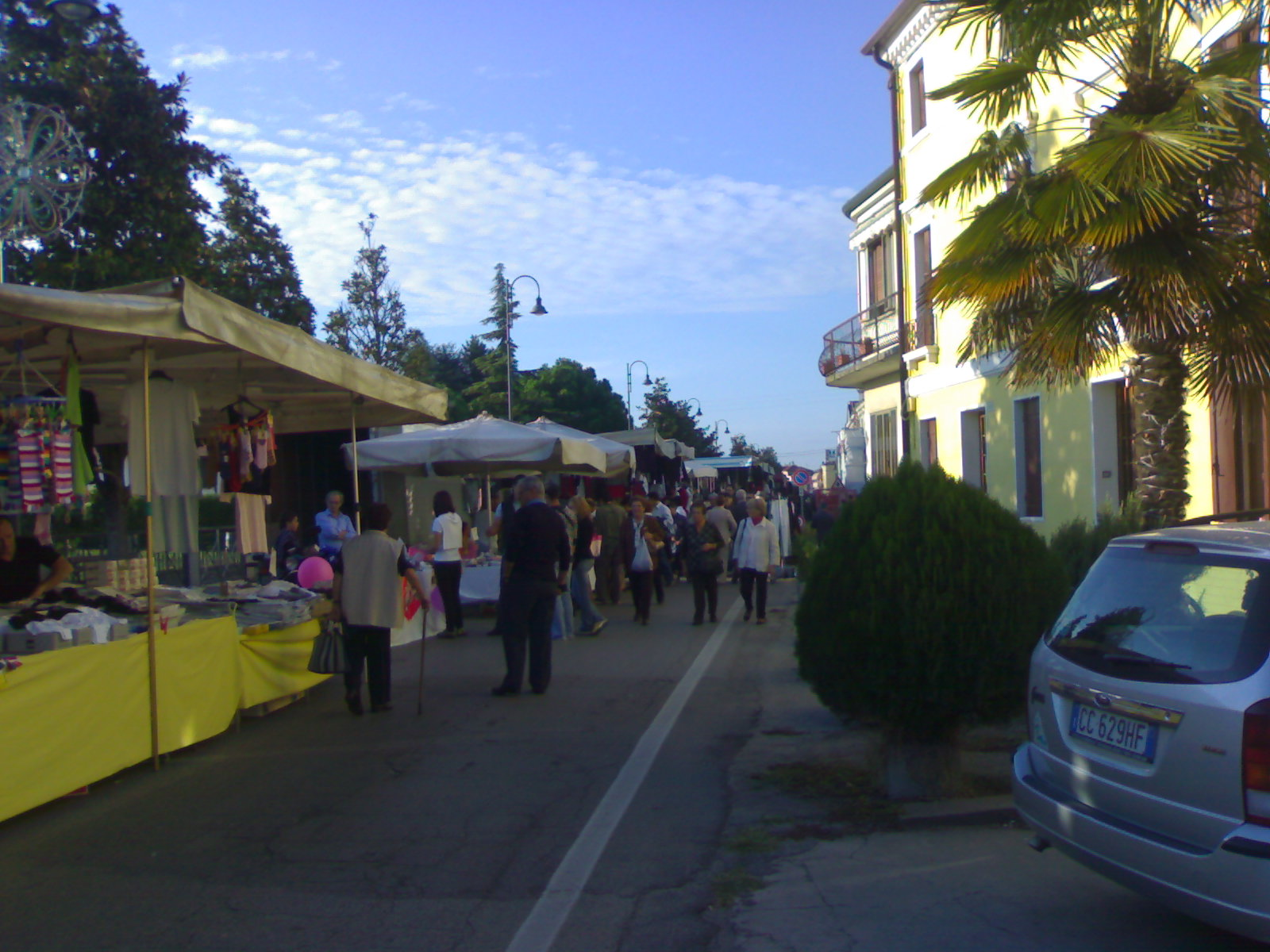 Villanova del ghebbo durante la fiera di settembre